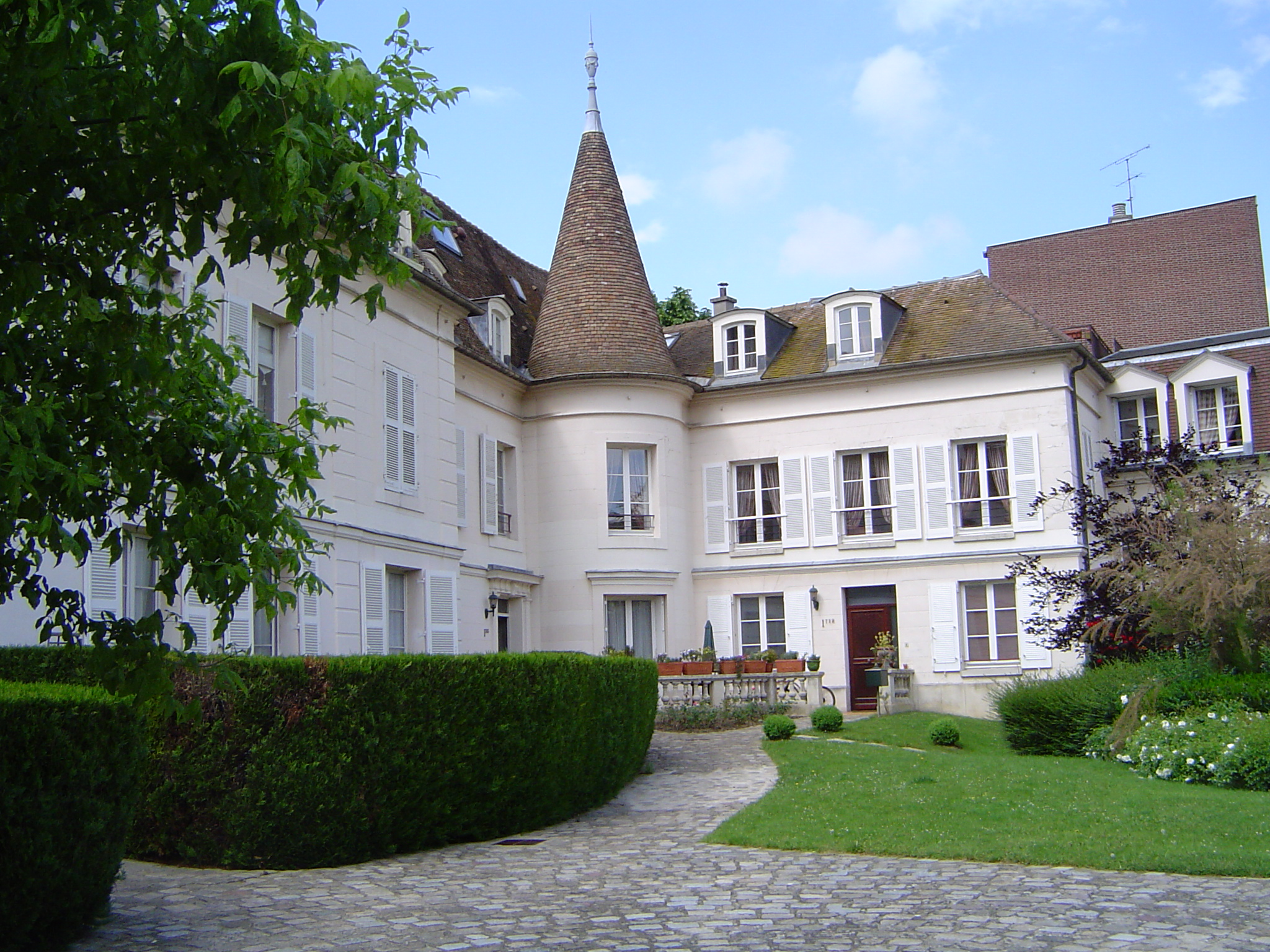 Antony